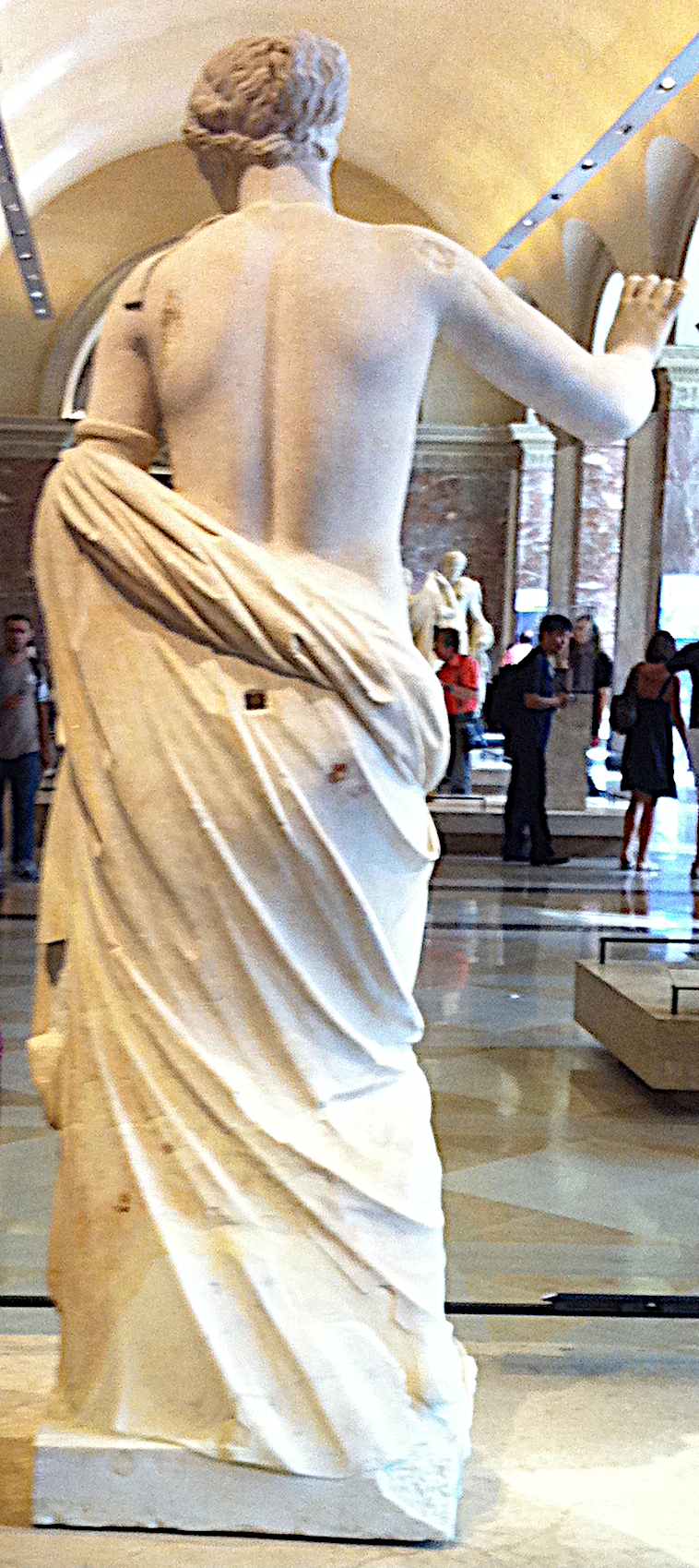 Vénus d'Arles (de dos) - Le Louvre Galerie Sully - salle 15 - Statue d'Aphrodite, dite Vénus d'Arles. Marbre de l'Hymette, œuvre romaine de l'époque de l'empereur Auguste (fin du Ier siècle av. J.-C.), peut-être une copie de l'Aphrodite de Thespies réalisée par Praxitèle (360 av J.-C.). La pomme et le miroir sont des ajouts de Girardon réalisés au XVIIe siècle. Découverte en 1651 dans le théâtre antique d'Arles, France. Sous cet angle, on aperçoit les mutilations de l'omoplate gauche et de l'épaule droite, ainsi que le trou de crampon par où la statue était fixée à sa niche